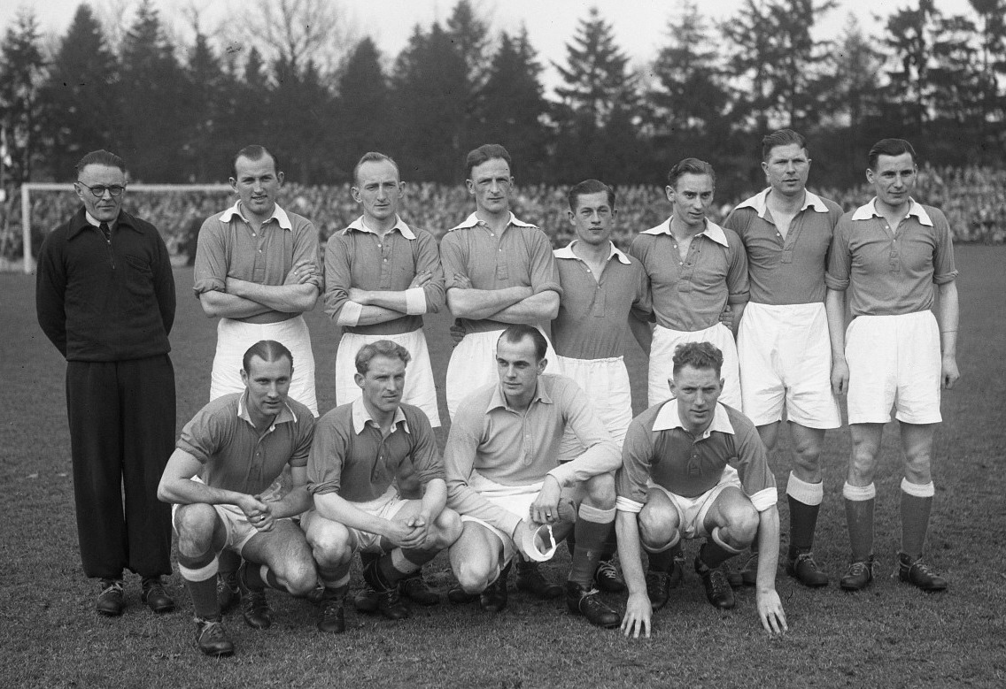 SC Enschede tegen Enschedese Boys. Enschedese Boys elftal.